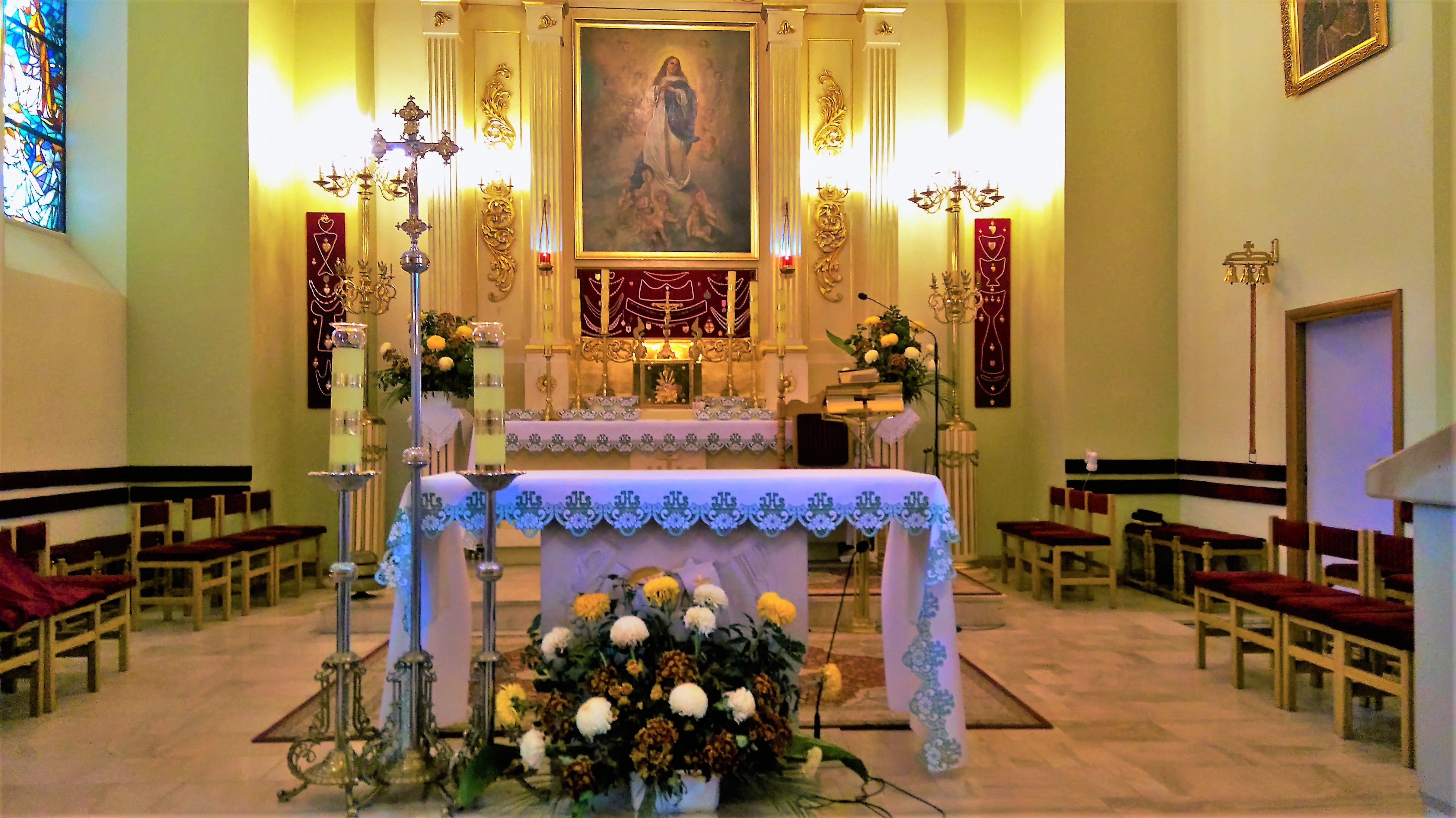 Celestynów, pl. Wyszyńskiego 3 - rzymskokatolicki kościół parafialny p.w. Wniebowzięcia Najświętszej Maryi Panny, 1930-1932 (ołtarz główny).